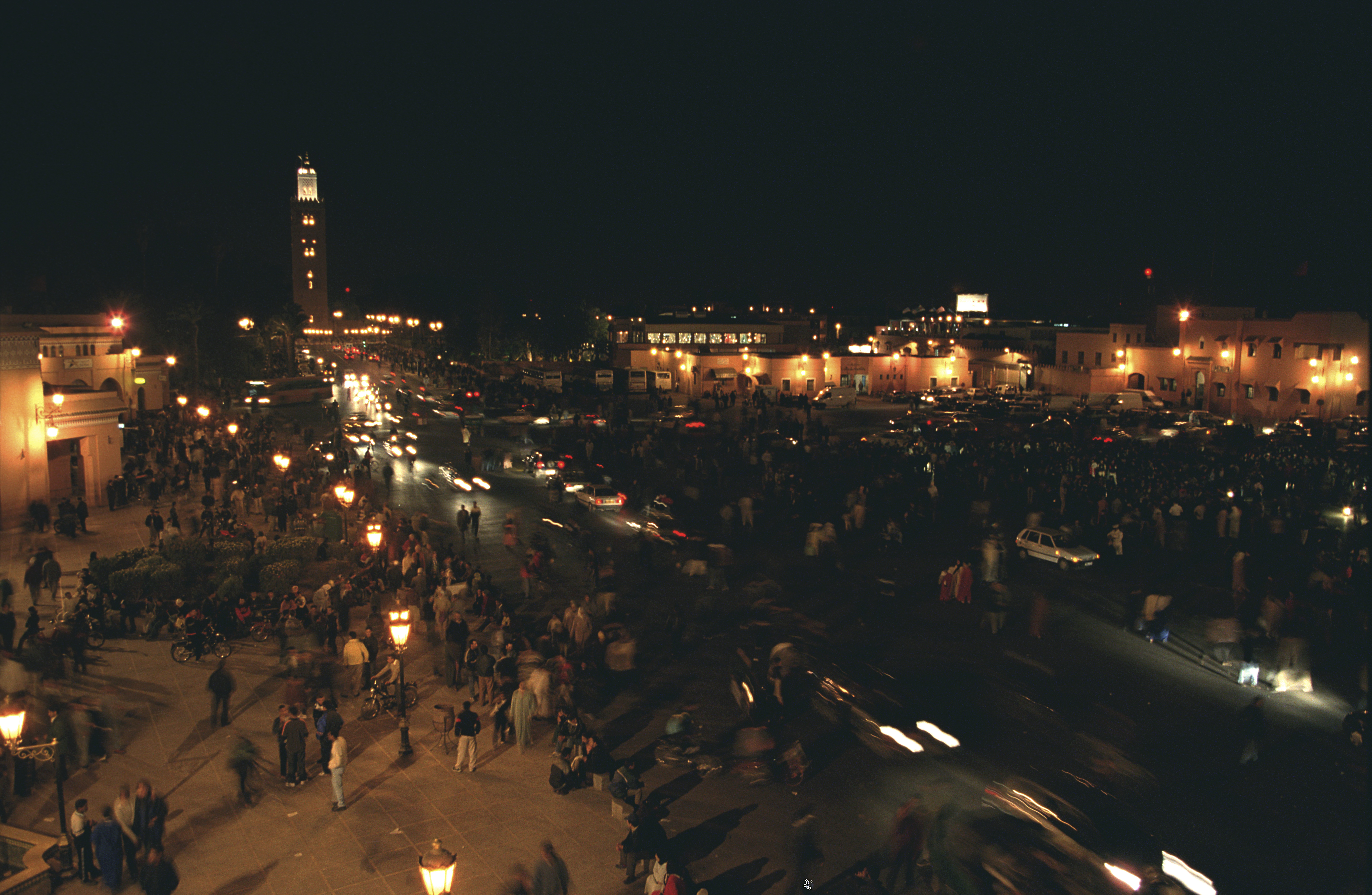 Marrakesh, Djemaa el Fna